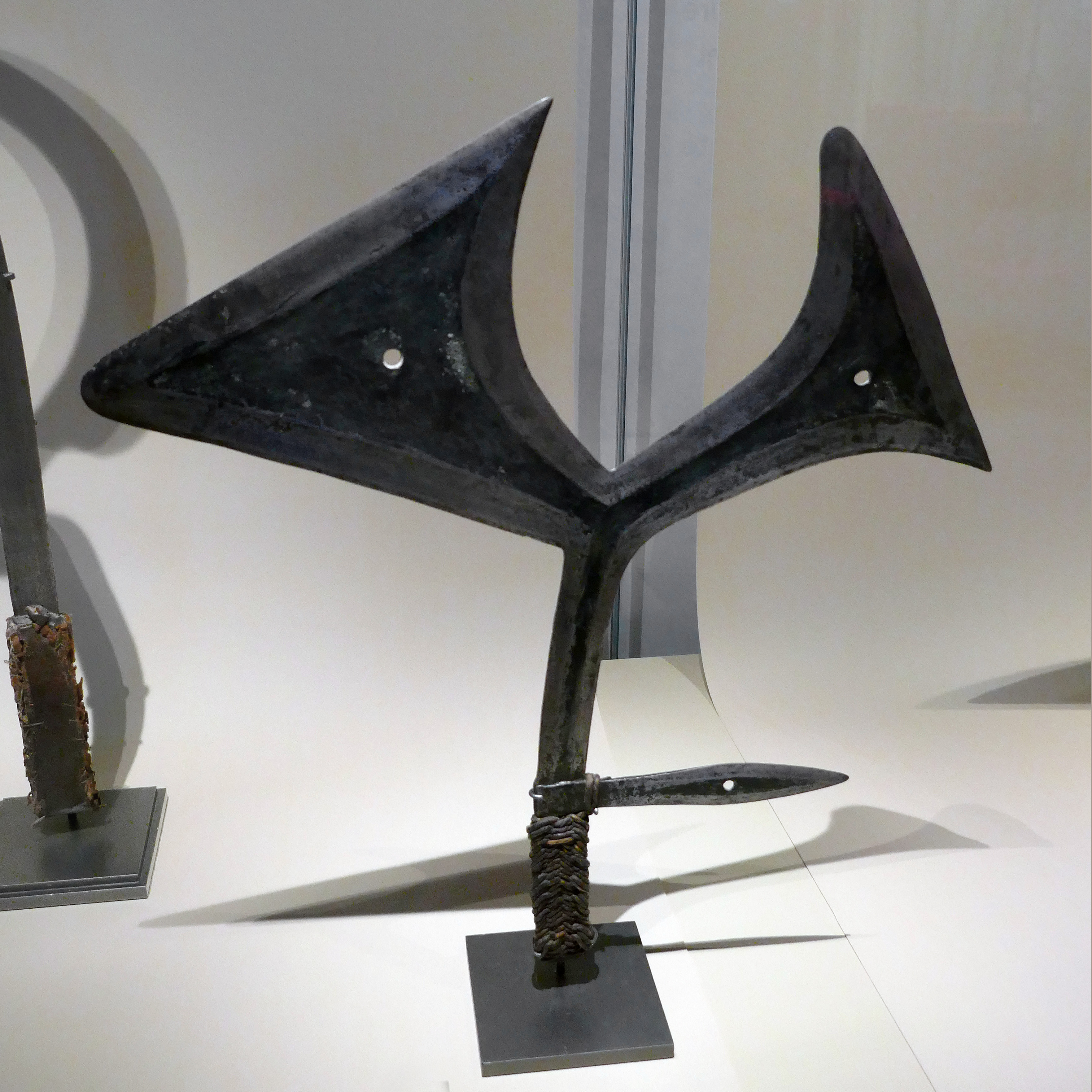 Couteau de jet Artiste inconnu Population Gbaya du sud, République centrafricaine Fer, cuir Fin du 19e -début du 20e siècle Collection privée Objet présenté lors de l'exposition Frapper le fer. L'art des forgerons africains au musée du quai Branly Jacques Chirac.